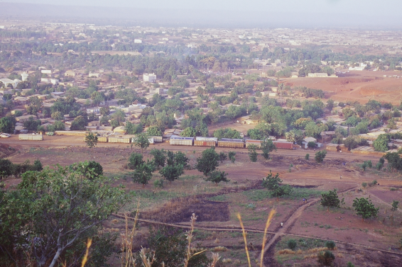 Vue sur la ville de Kati (Mali) avec la Gare.